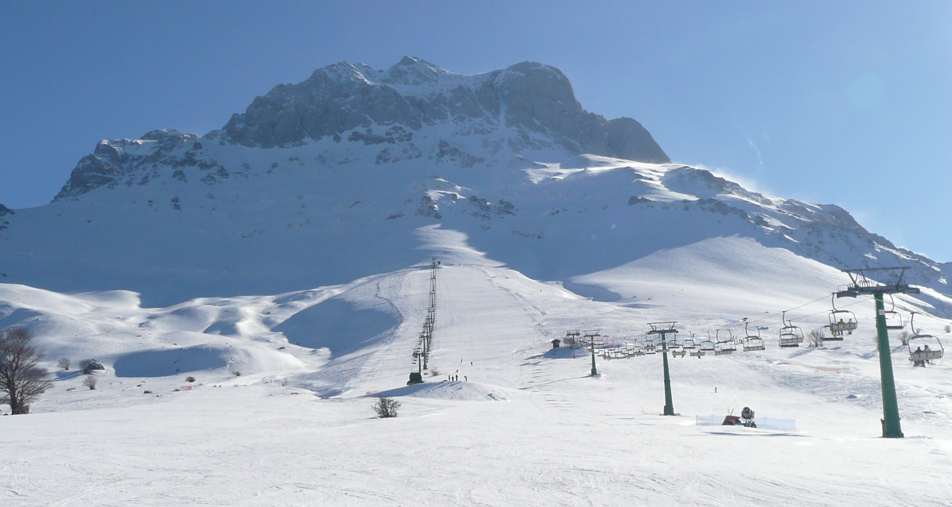 Prati di Tivo è una piccola stazione sciistica in Provicia di Teramo, Abruzzo, Italia